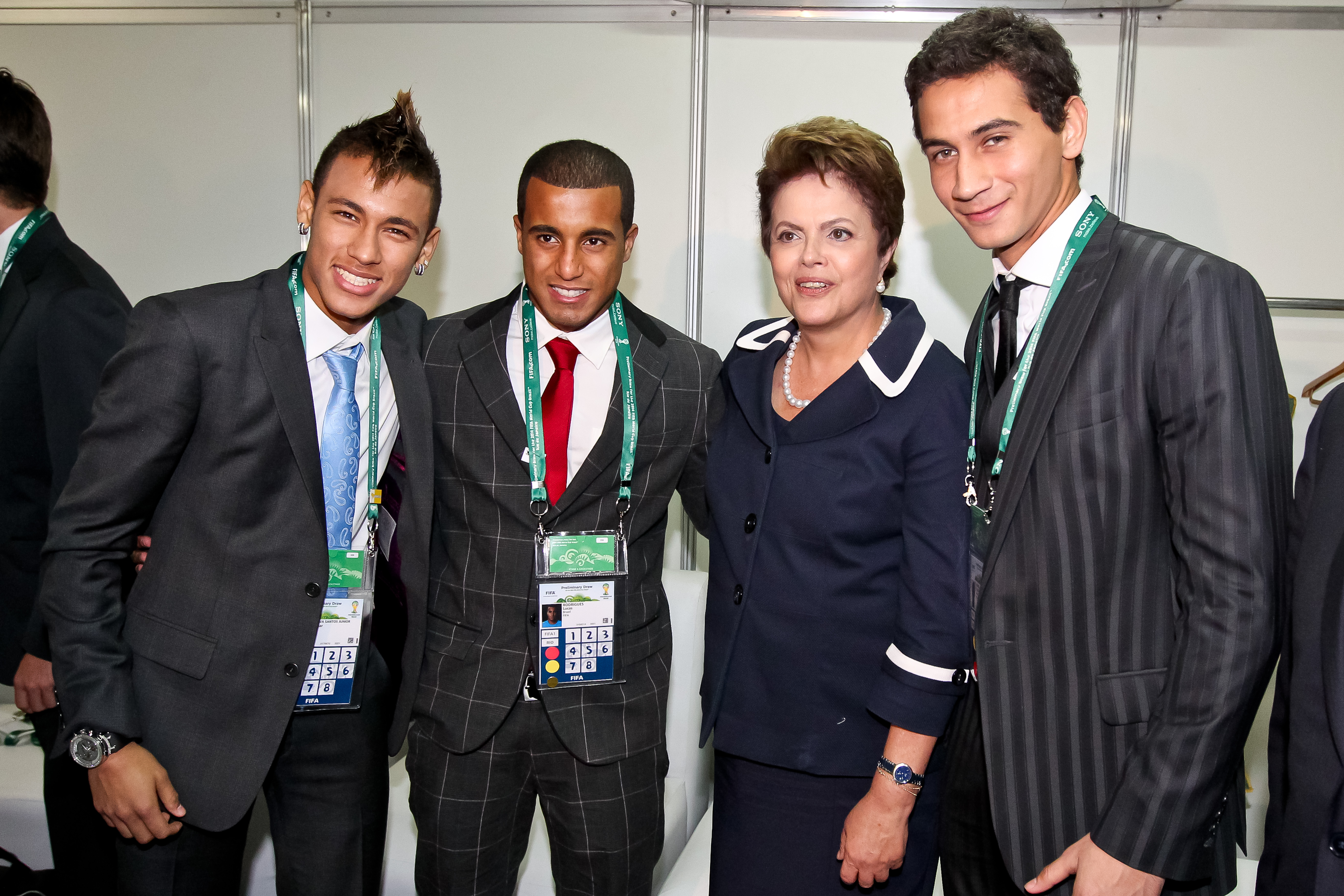 Presidenta Dilma Rousseff posa para foto com os jogadores Neymar, Lucas e Ganso após a cerimônia de sorteio preliminar da Copa do Mundo (Rio de Janeiro,RJ,30/07/2011) Foto: Roberto Stuckert Filho/PR